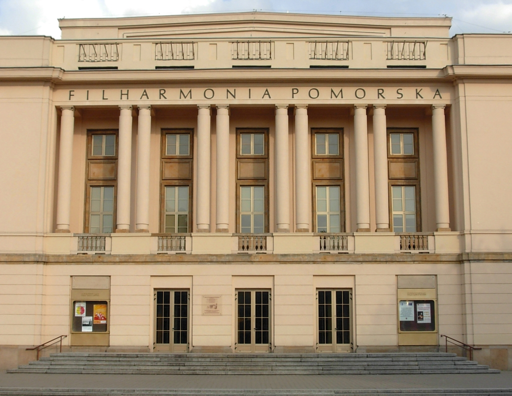 Filharmonia Pomorska w Bydgoszczy